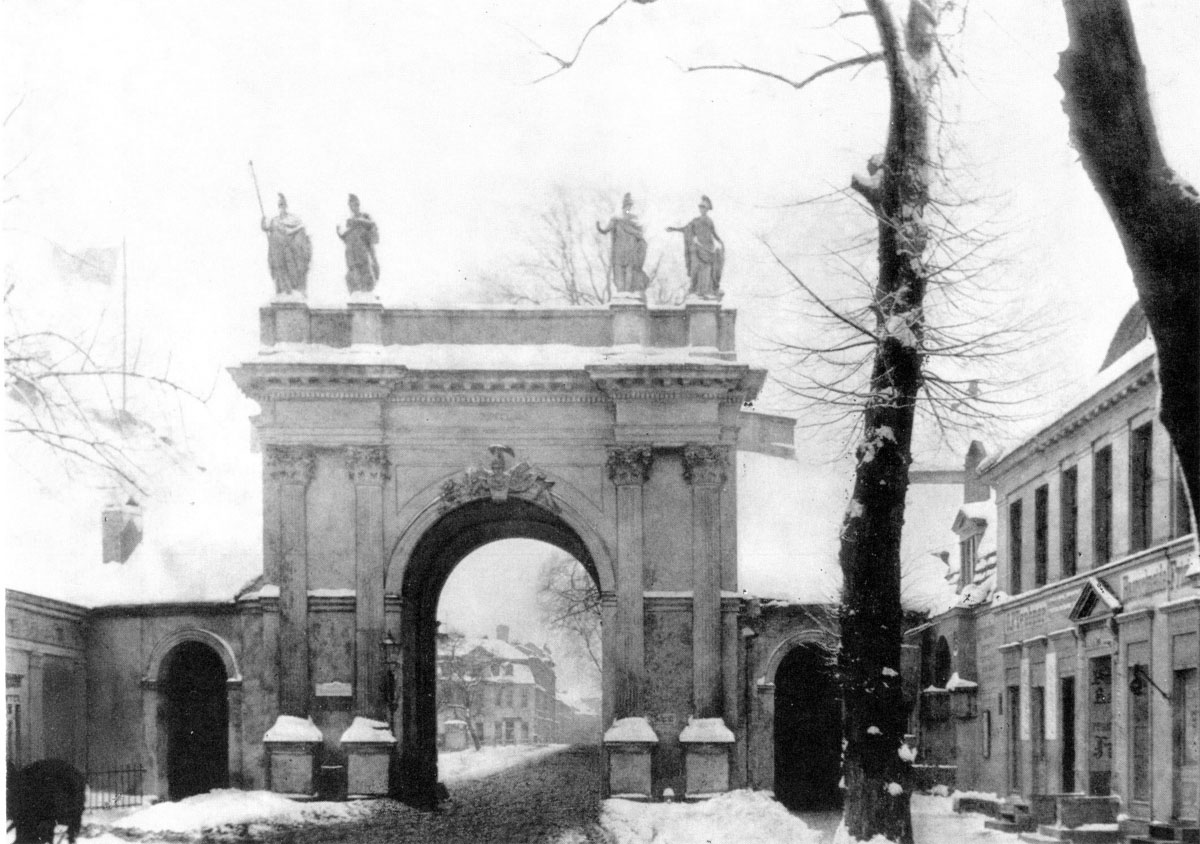 Berliner Tor in Potsdam 1895 (Berlin Gate in Potsdam 1895)